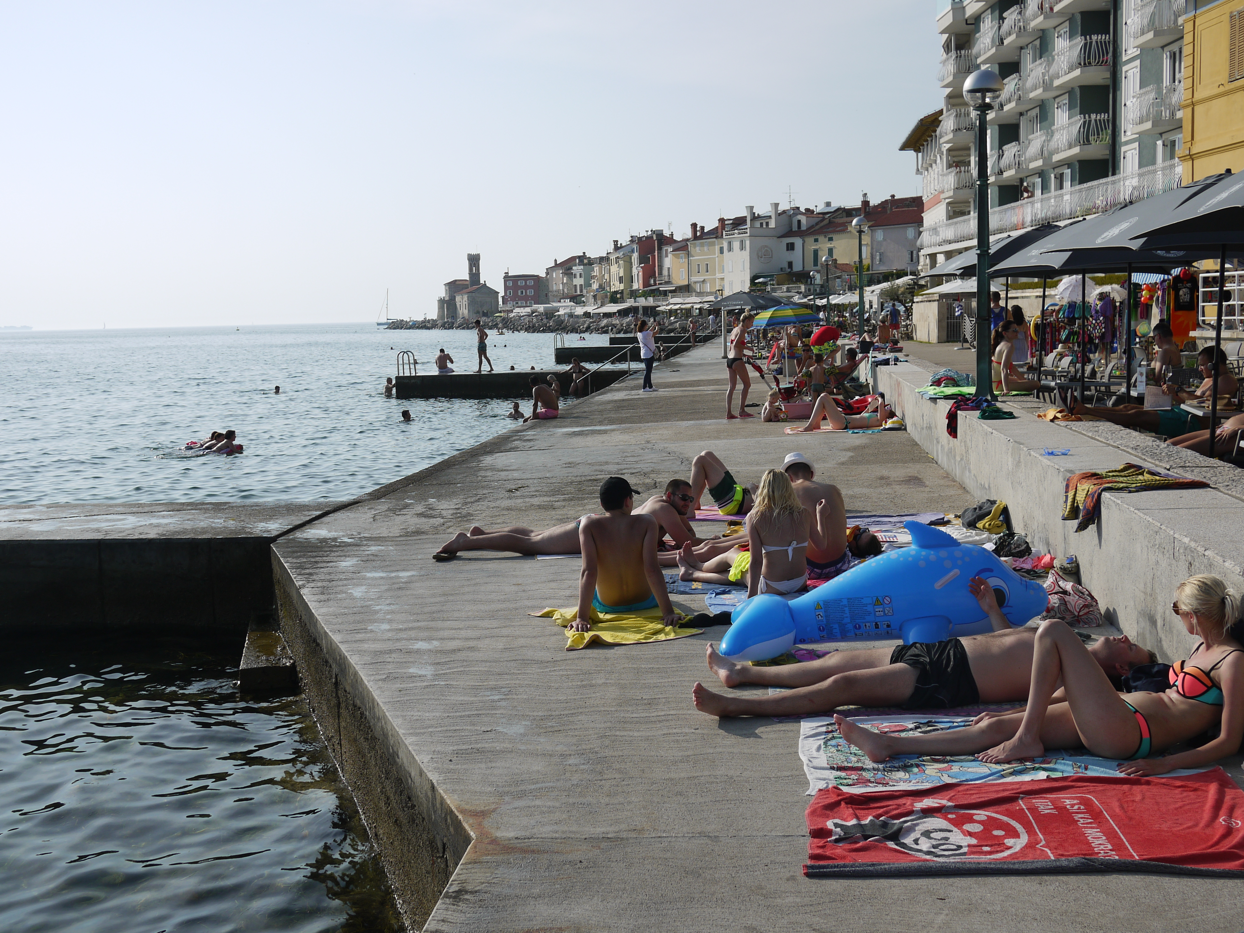 Piran, Slovenia